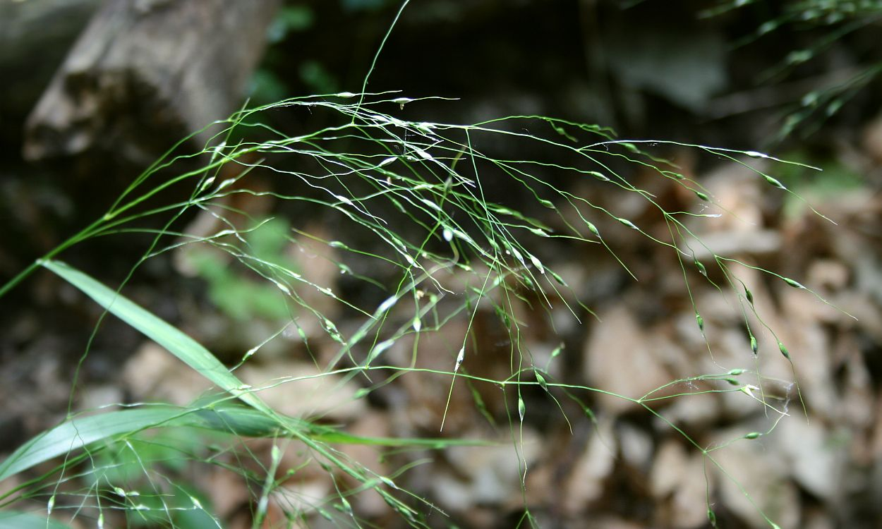 Grannenhirse (Piptatherum virescens), Süßgräser (Poaceae) - Ungarn/Magyarország/Hungary: Pest megye, Szénás-Hügel bei Pilisszentiván